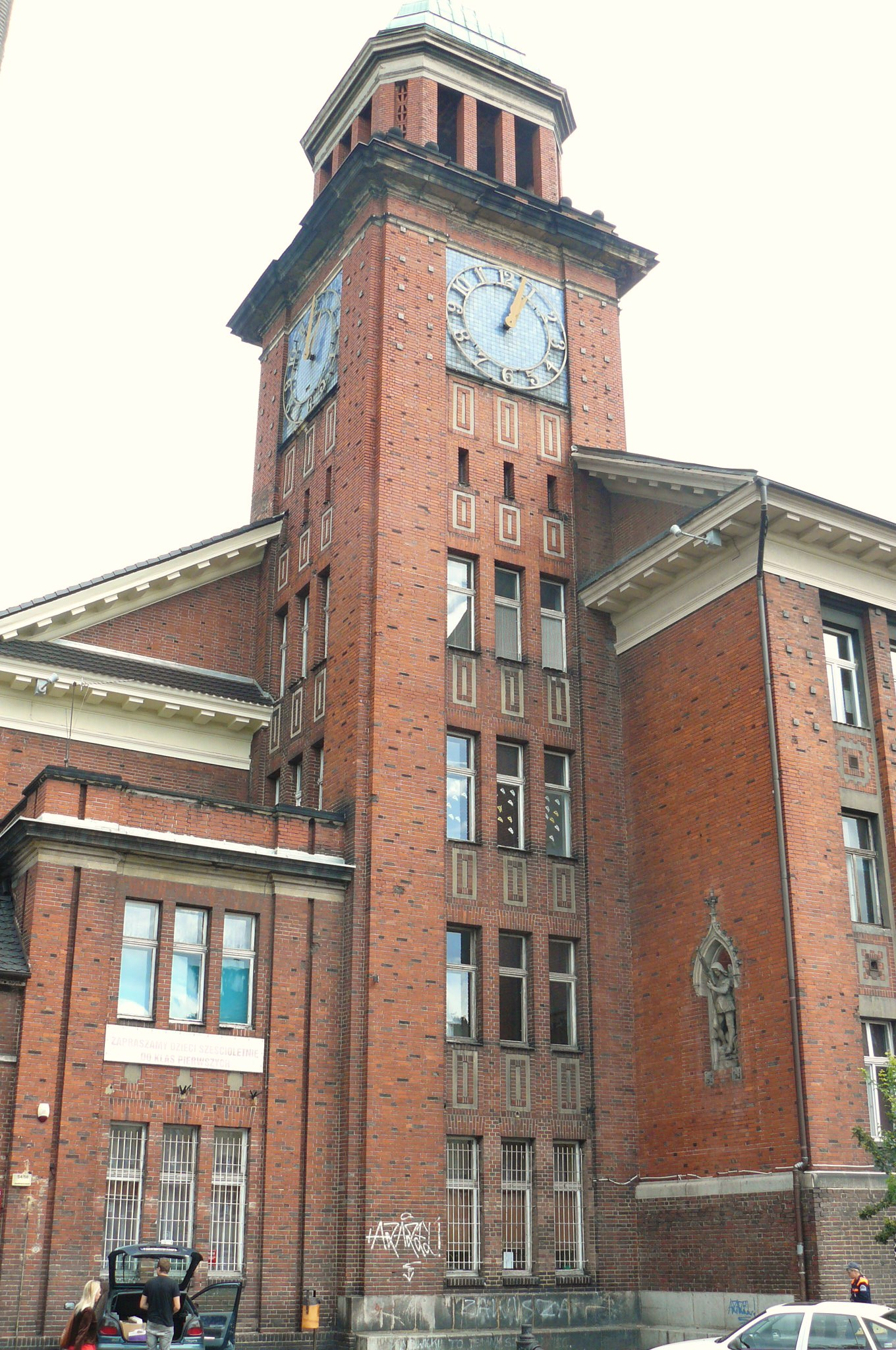 Poznań Jeżyce, ul. Słowackiego 54/60 - Szkoła Podstawowa nr 36 im. Henryka Sucharskiego, zespół zabudowań szkolnych